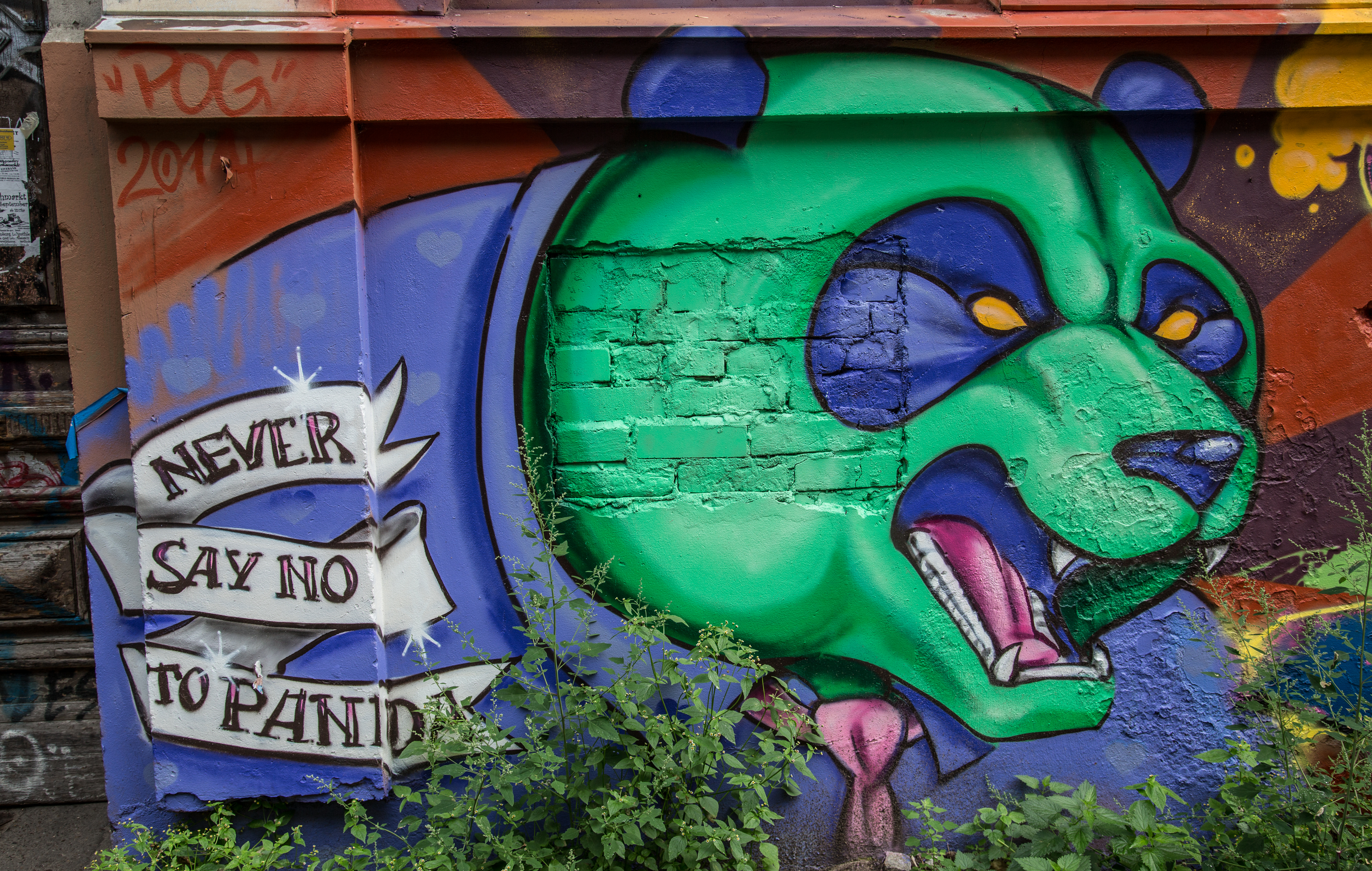 Scharni 38 — Scharnweberstraße & Colbestraße, Berlin, Germany